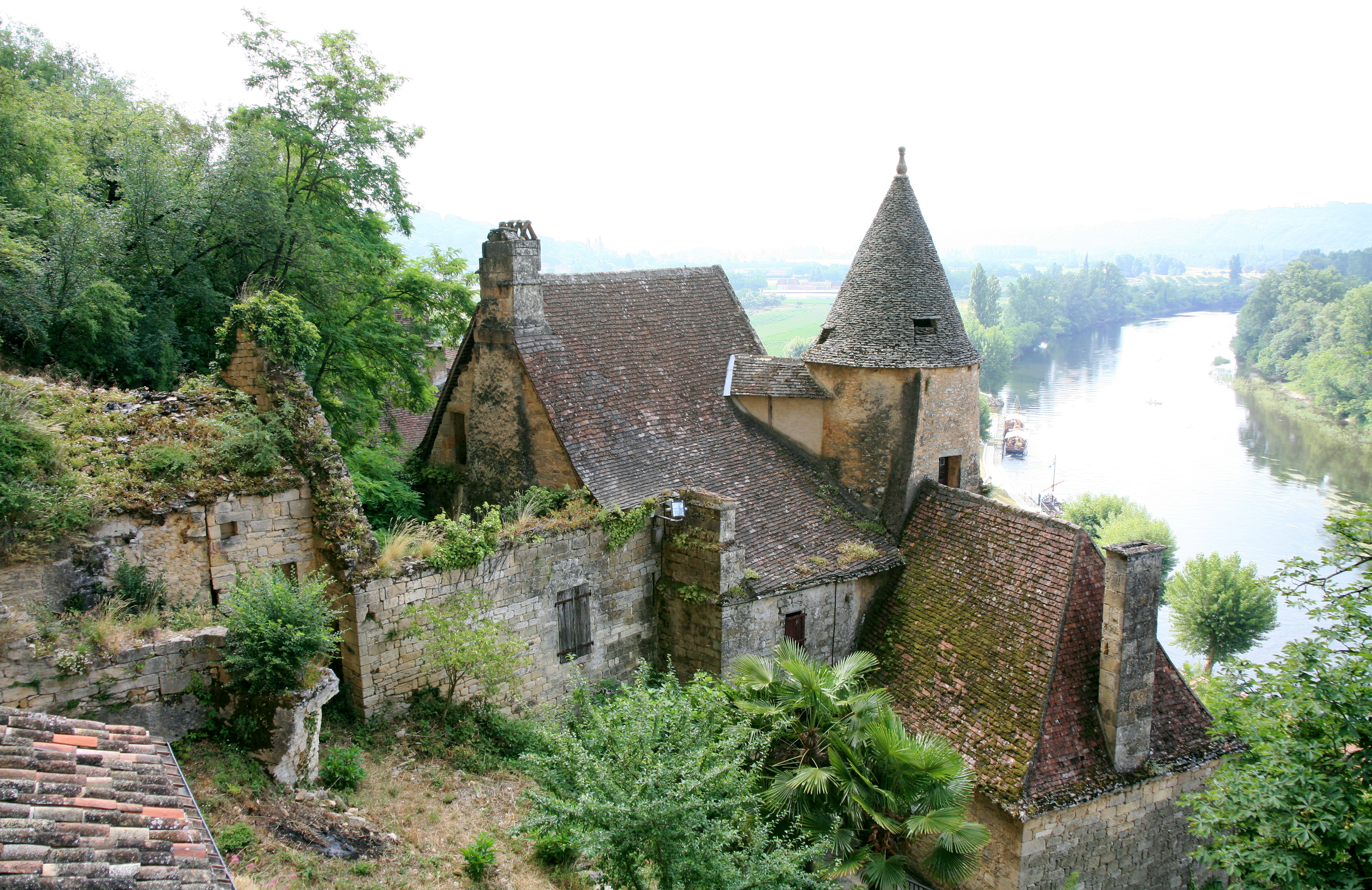 Le manoir de Tarde, La Roque-Gageac, Dordogne, France